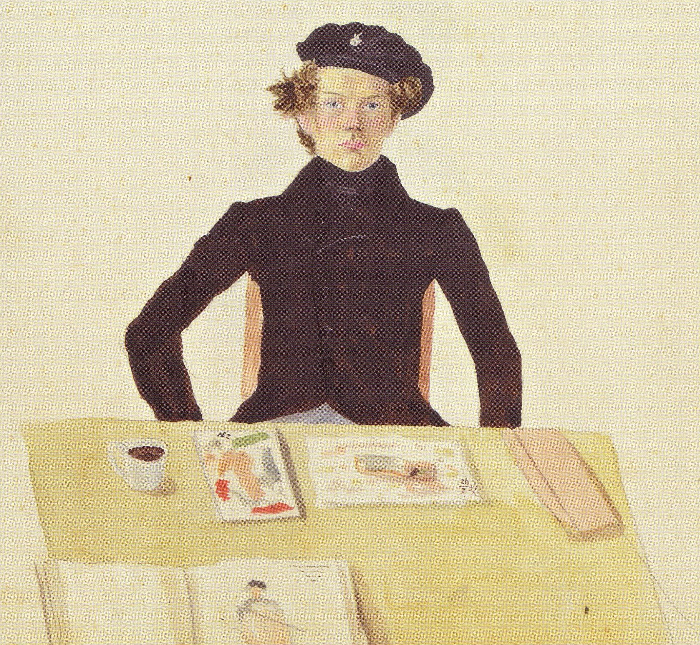 Selbstporträt von Wilhelm Schmiedeberg